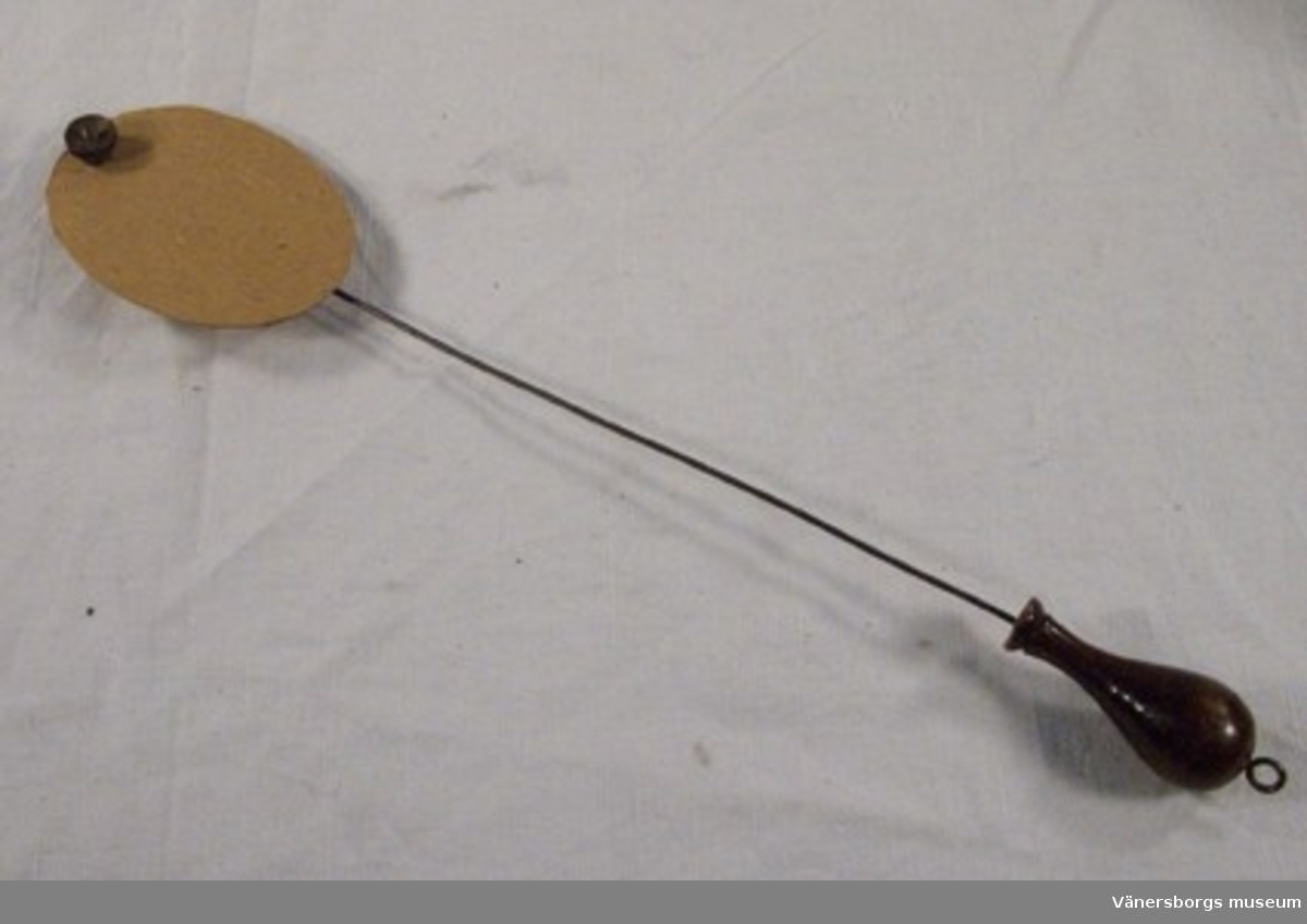 En pjatt. Verktyget används i ett mörkrum för framkallning av negativ fotofilm, för att skugga partier av fotopapperet. Resultatet blir ett ljusare fält i den framkallade bilden. Junstrands Foto, 1924.